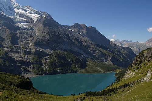 Blick auf den Oeschinensee vom Oberbärgli aus